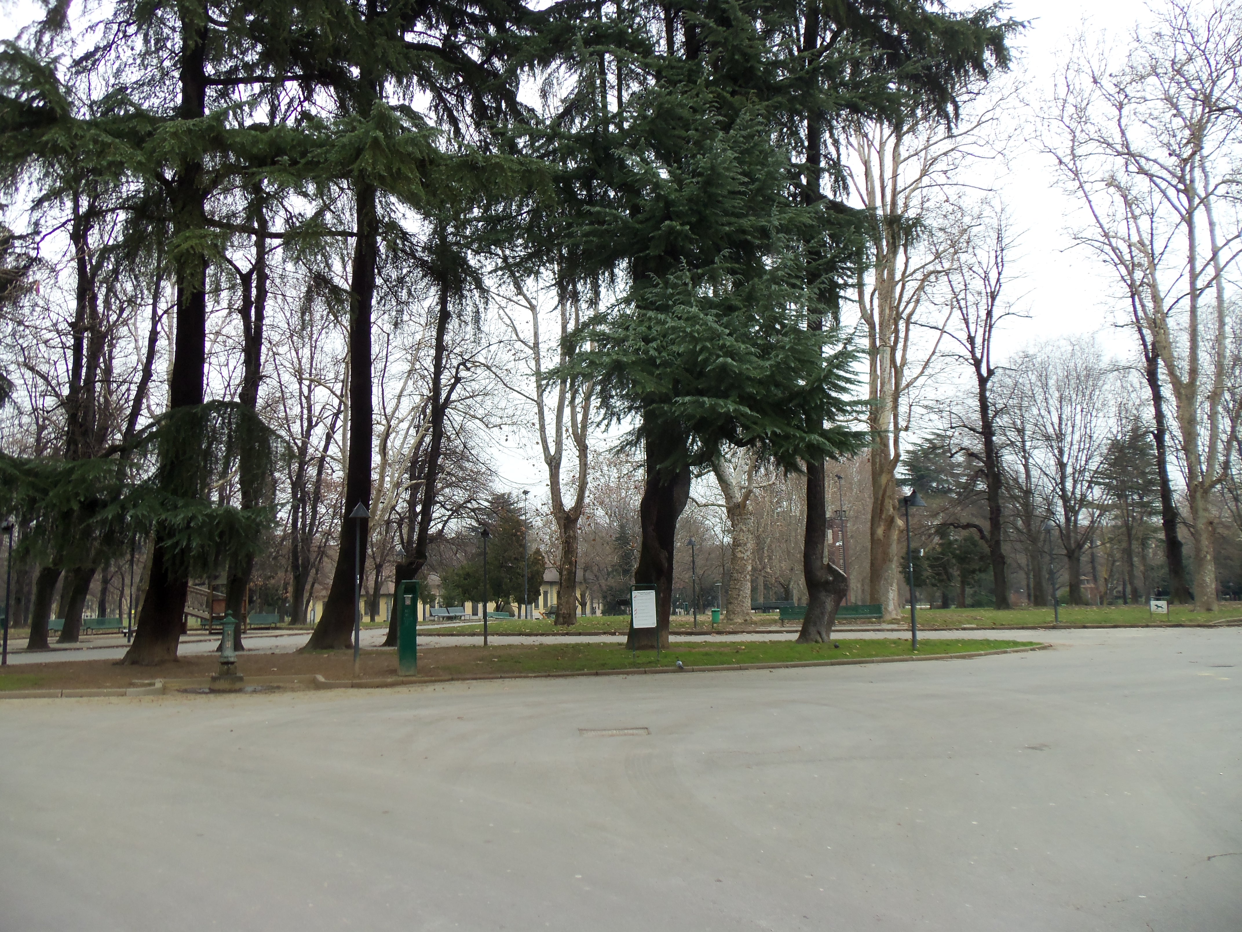 Milano, Parco Trotter